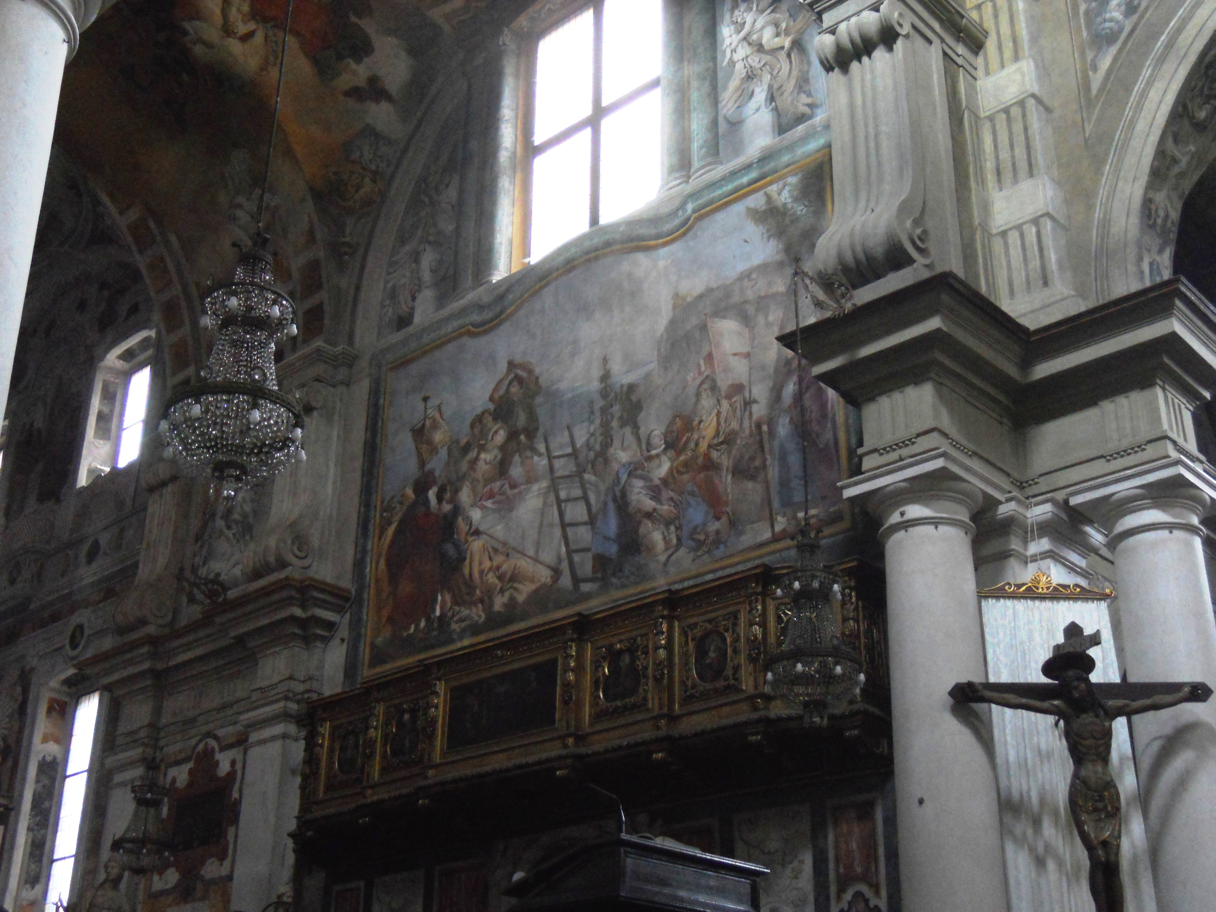 overview